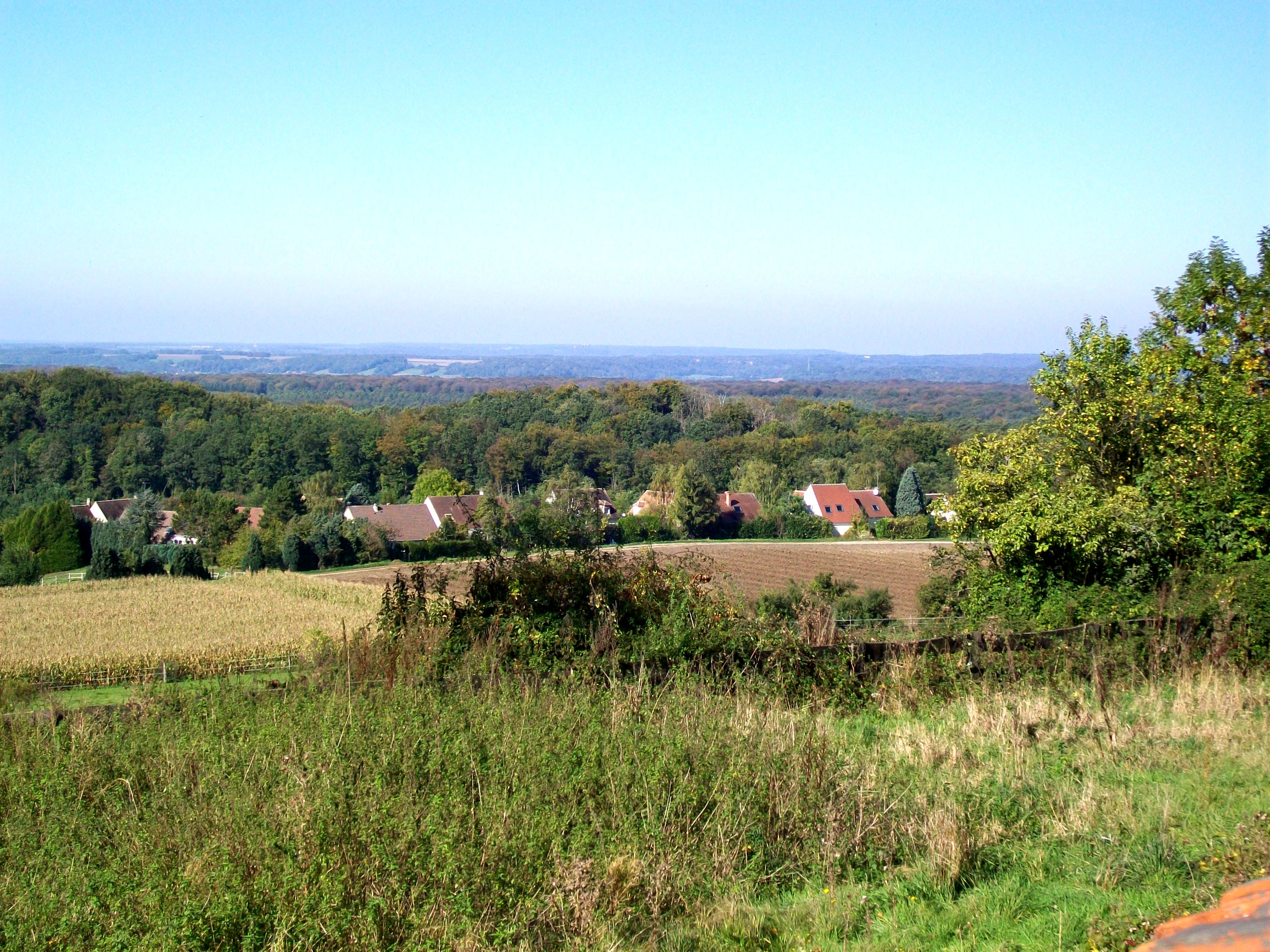 Vue sur les premières maisons de Fleurines depuis la butte de Saint-Christophe. Le centre ancien du village est situé derrière la pente, non visible.